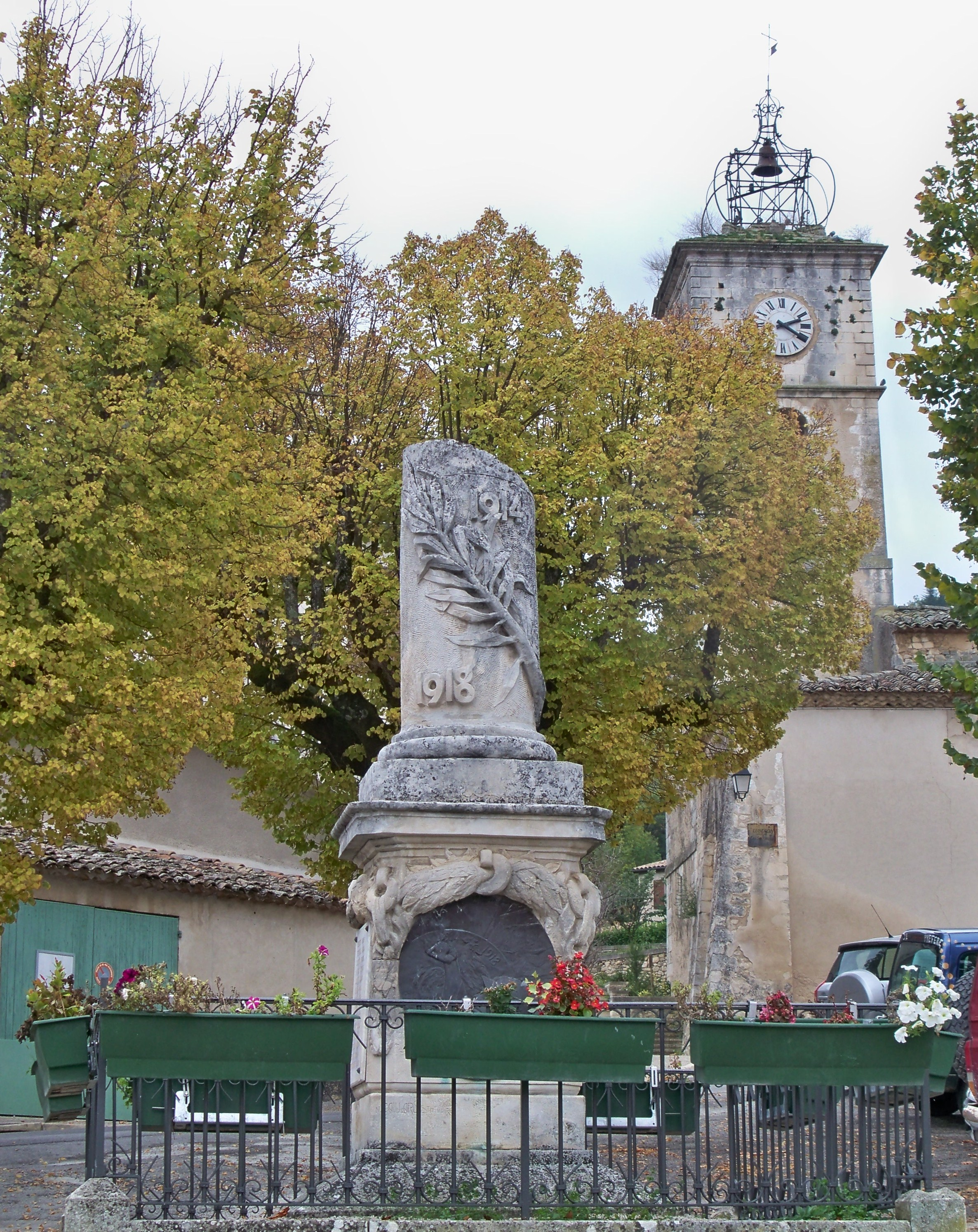 Monuments aux Morts à Céreste, Alpes de Haute Provence, France